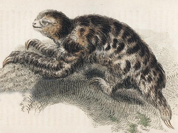 Карликовый ленивец (лат. Bradypus pygmaeus)